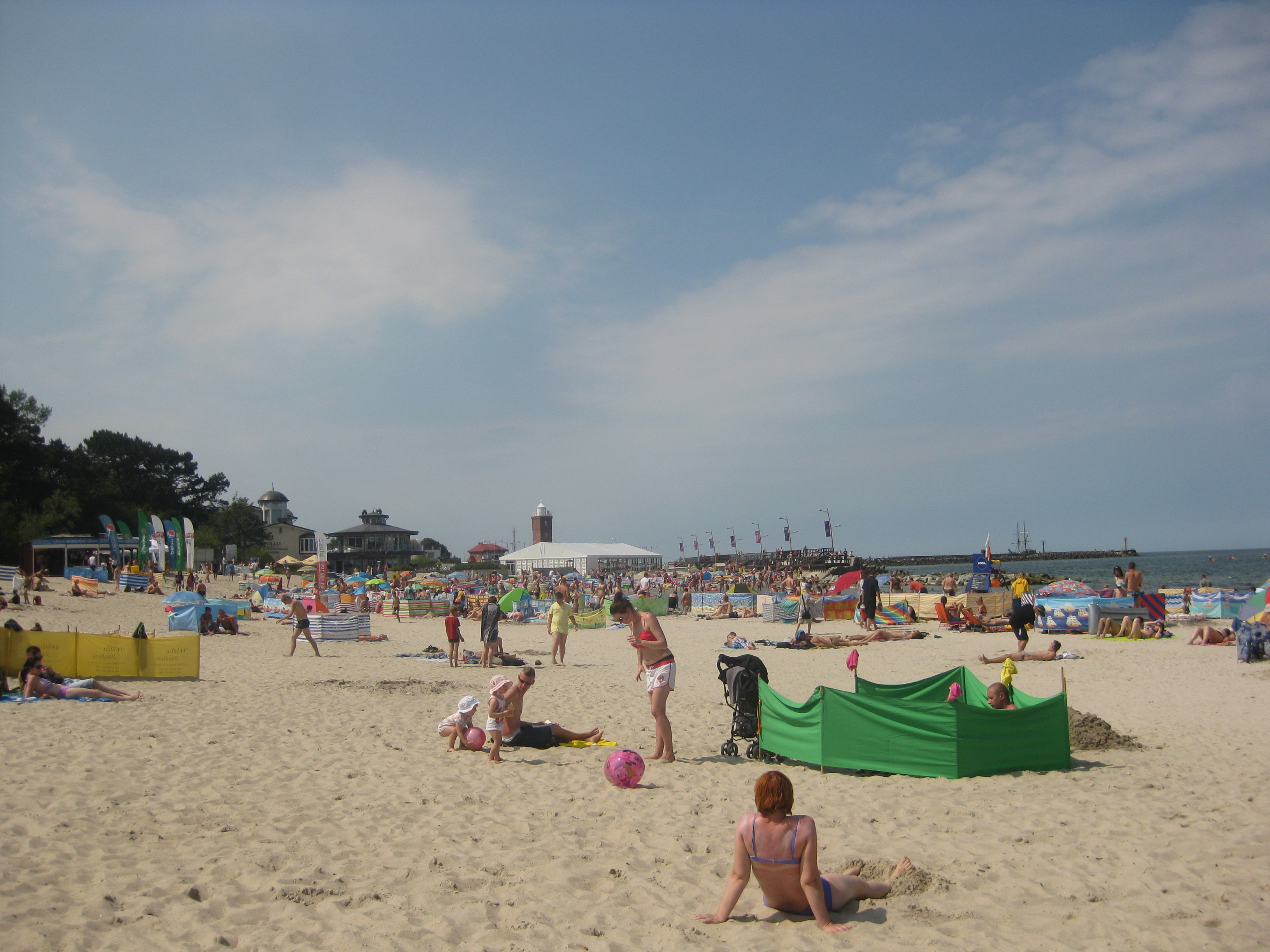 Darłówko - plaża i latarnia